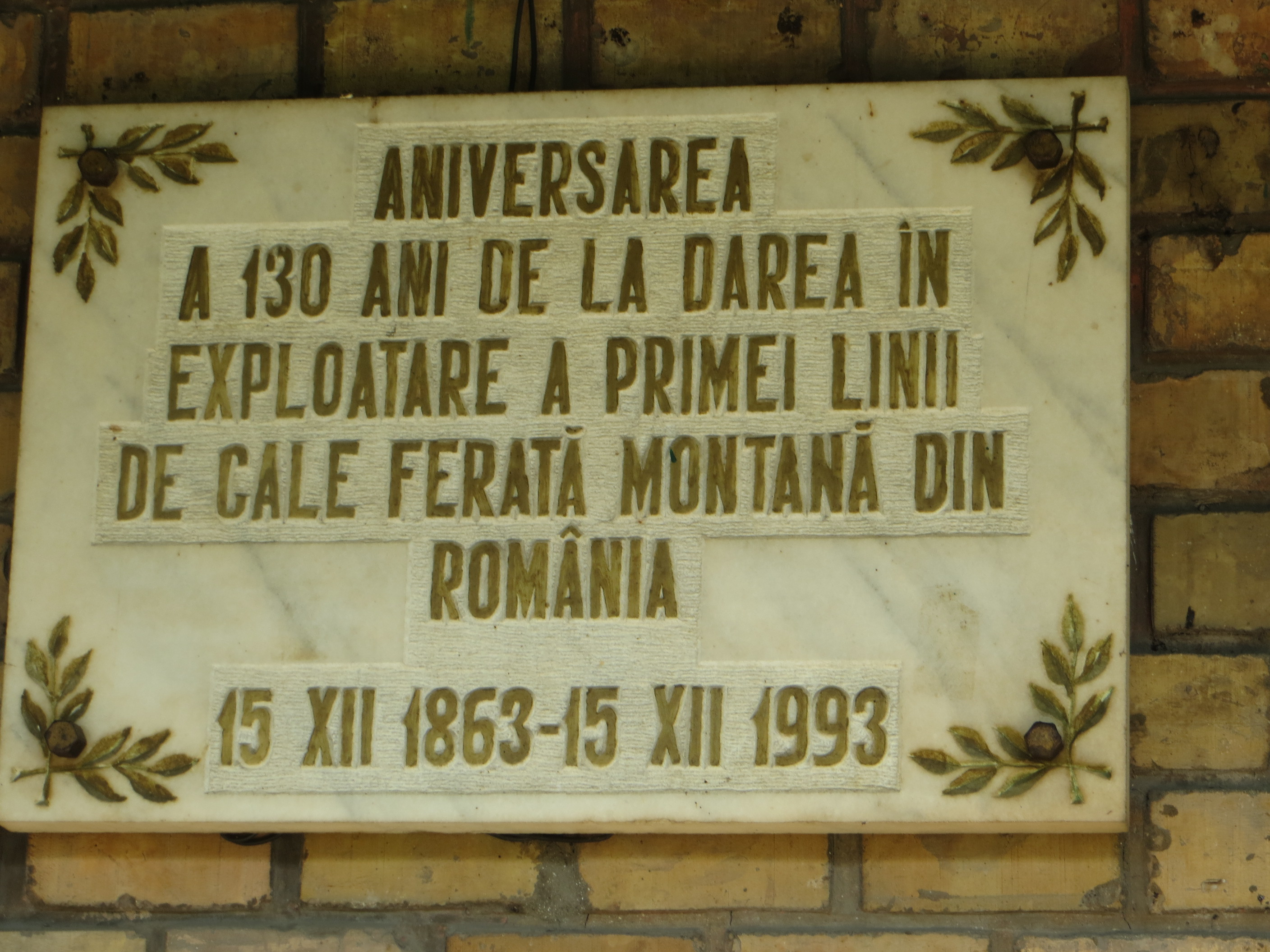 Porțiunea de cale ferată Oravița-Anina - 33,4 km: placă comemorativă la împlinirea a 135 de ani 02